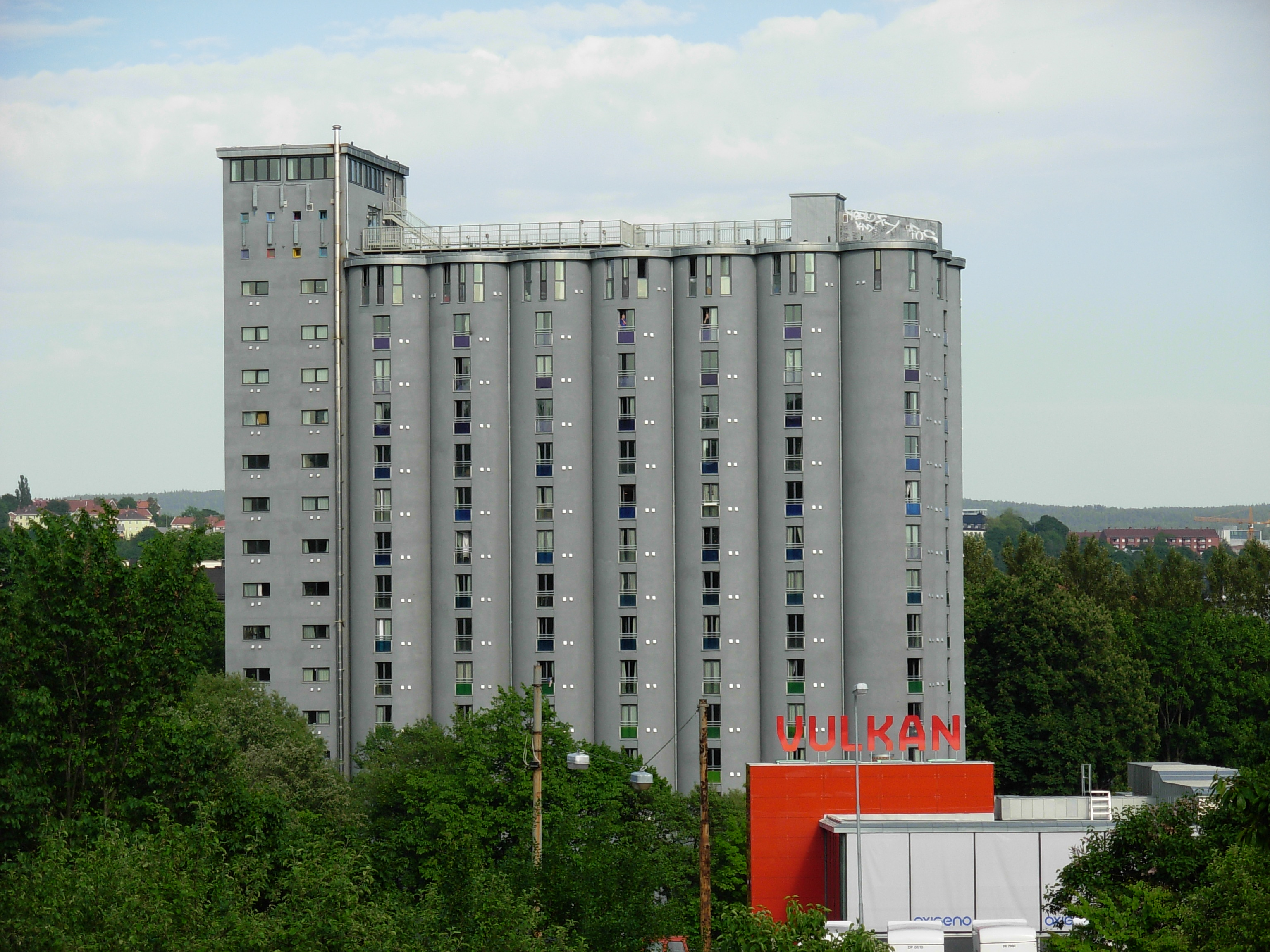 Grünerløkka Studenthus, Oslo